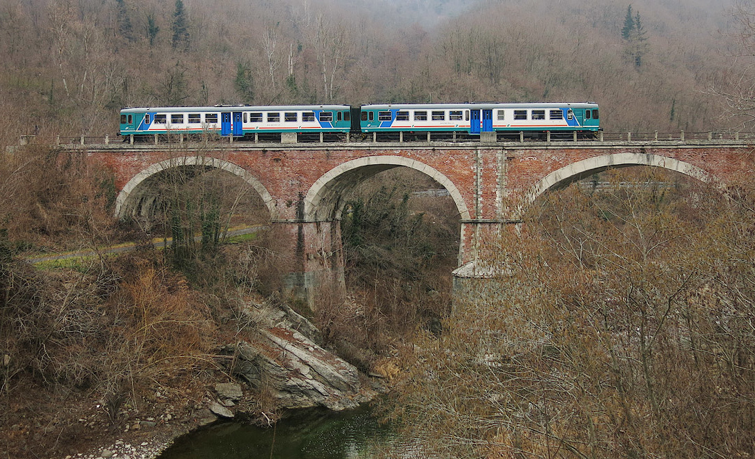 Doppia ALn 663 (1004 e 1014) in transito sul ponte ferroviario di Nucetto del fiume Tanaro, che partendo da Torino Porta Nuova, testava un viaggio con le autorità a bordo, in vista della riapertura della linea a scopi turistici.